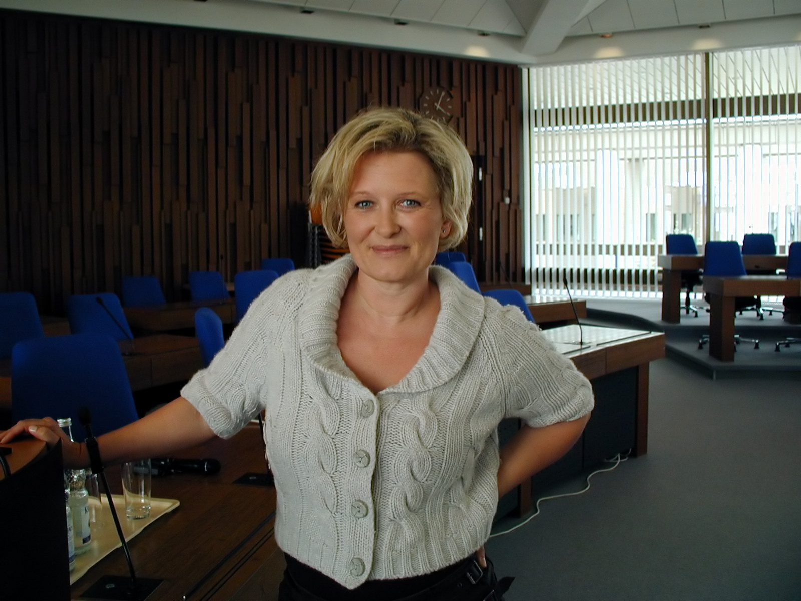 Chris Rupp General Manager der SOPHIST GROUP, Nürnberg